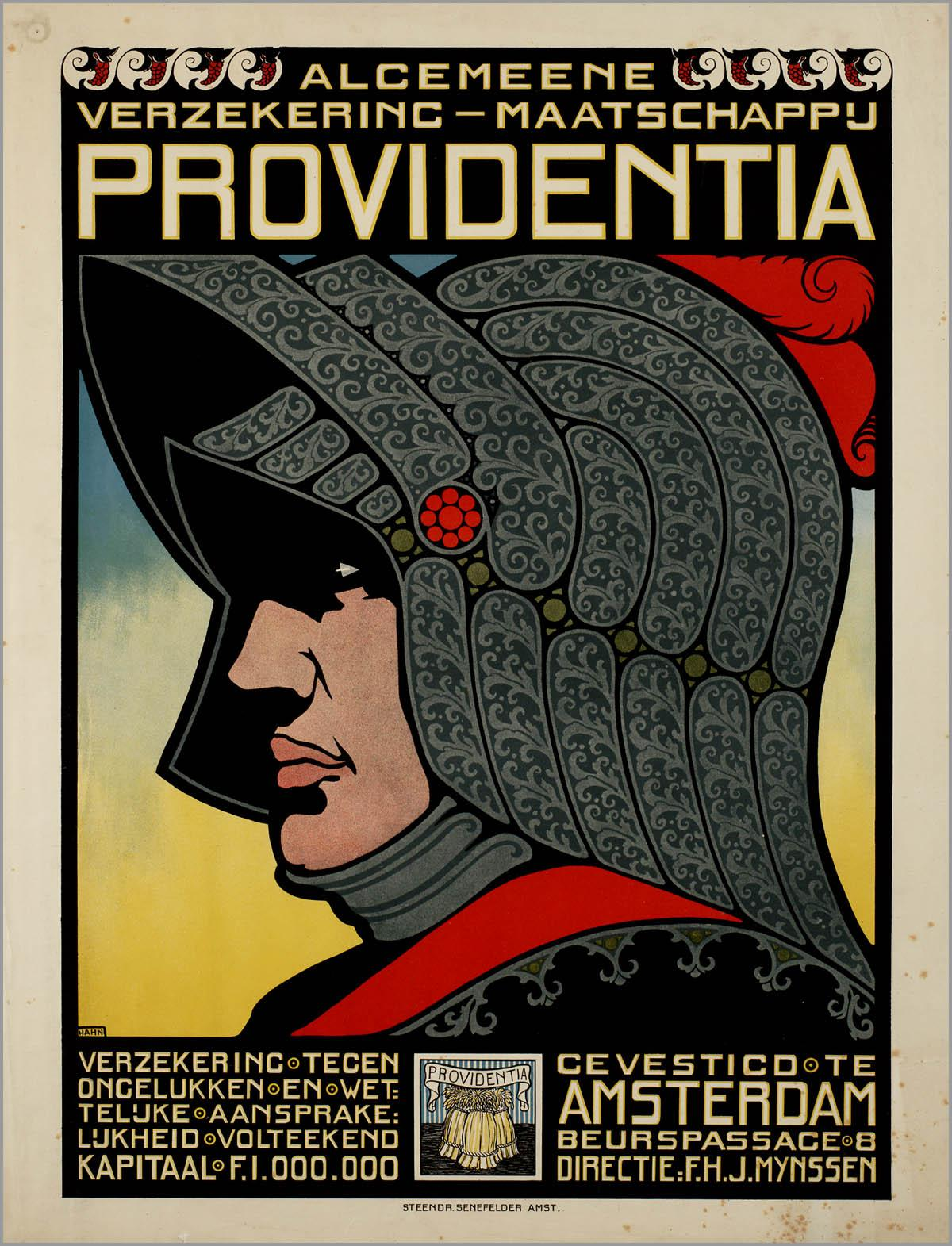 Affiche. "Algemeene Verzeekering-Maatschappij Providentia".